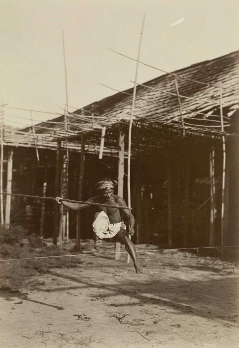 Foto. Deze foto is gemaakt tijdens de Commissiereis naar Centraal-Borneo van A.W. Nieuwenhuis. Een Dajak tijdens een hoogtesprong met de poolstok